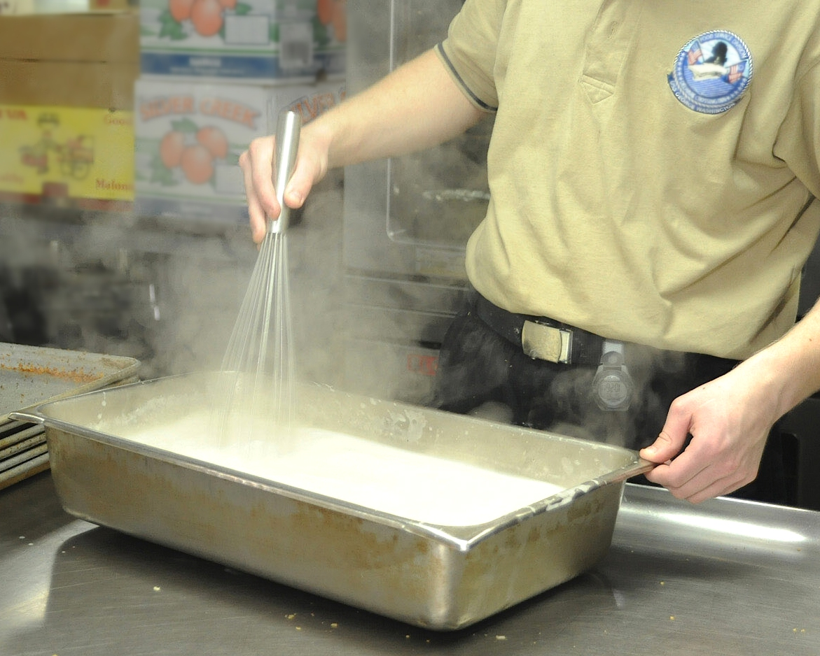 Aufschlagen (Montieren) einer heißen Sauce vor deren Ausgabe in einer Großküche, mit HIlfe eines Schneeebesens (hier an Bord eines Flugzeugträgers der U.S. Marine)